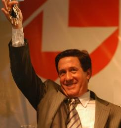 Darío Díaz Pérez (n. 1951), intendente del Partido de Lanús, Zona Sur del Gran Buenos Aires, Argentina, en un acto oficial.